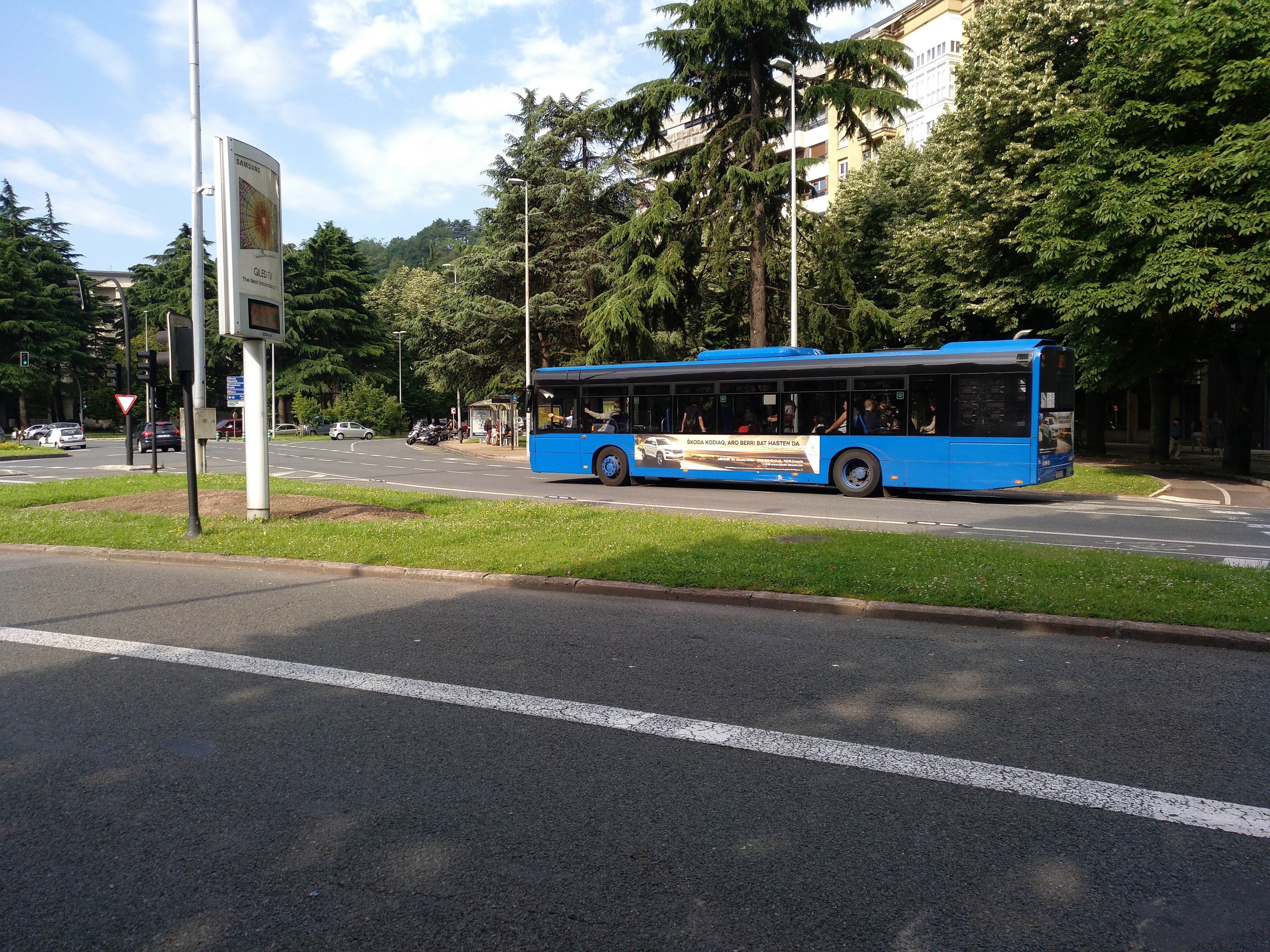 Autobús urbano de d·bus saliendo de Sancho el Sabio entrando en Pío XII en San Sebastián